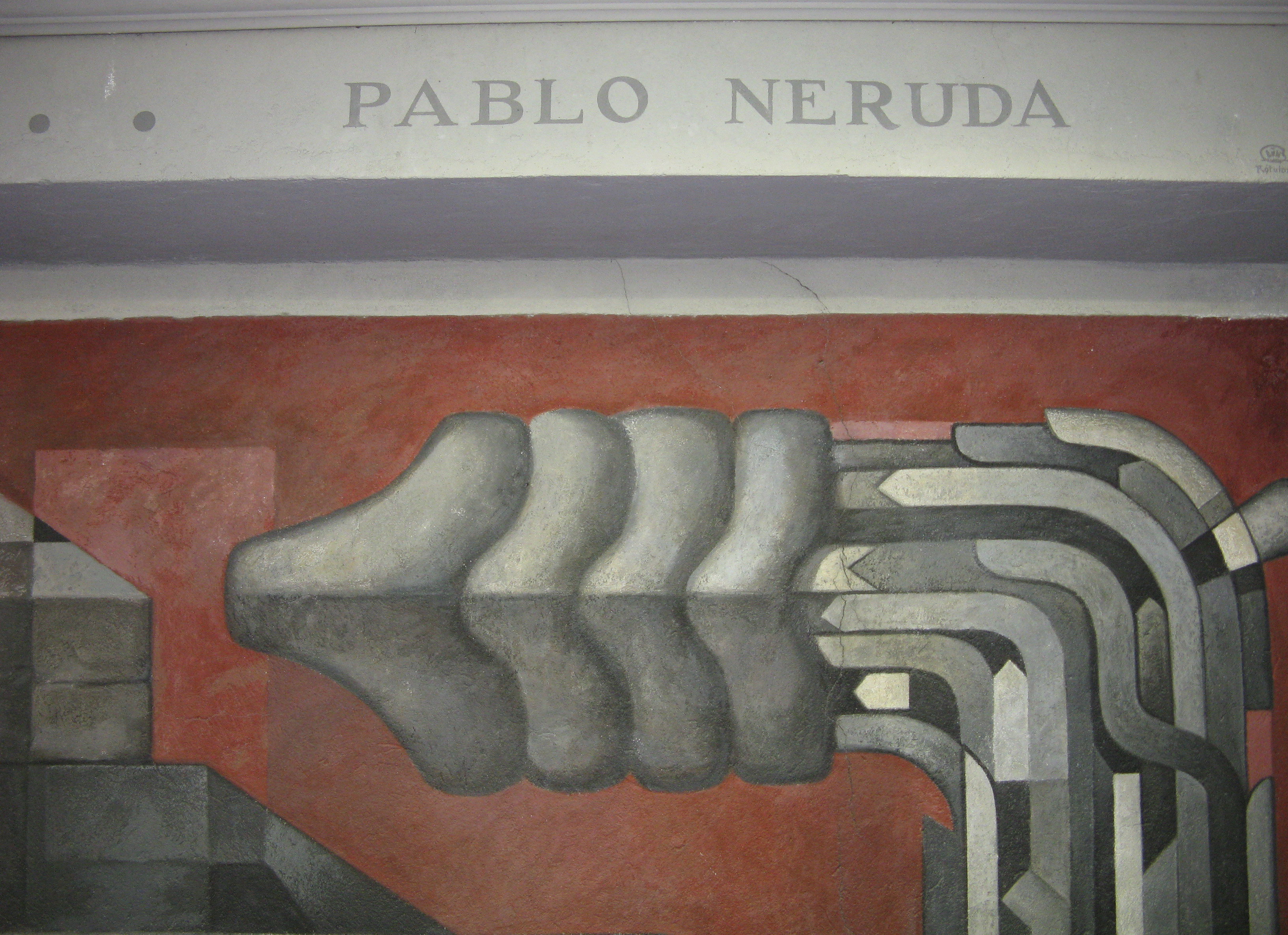 Parte del mural "Presencia de América Latina", ubicado en la Casa del Arte, Universidad de Concepción, Chile